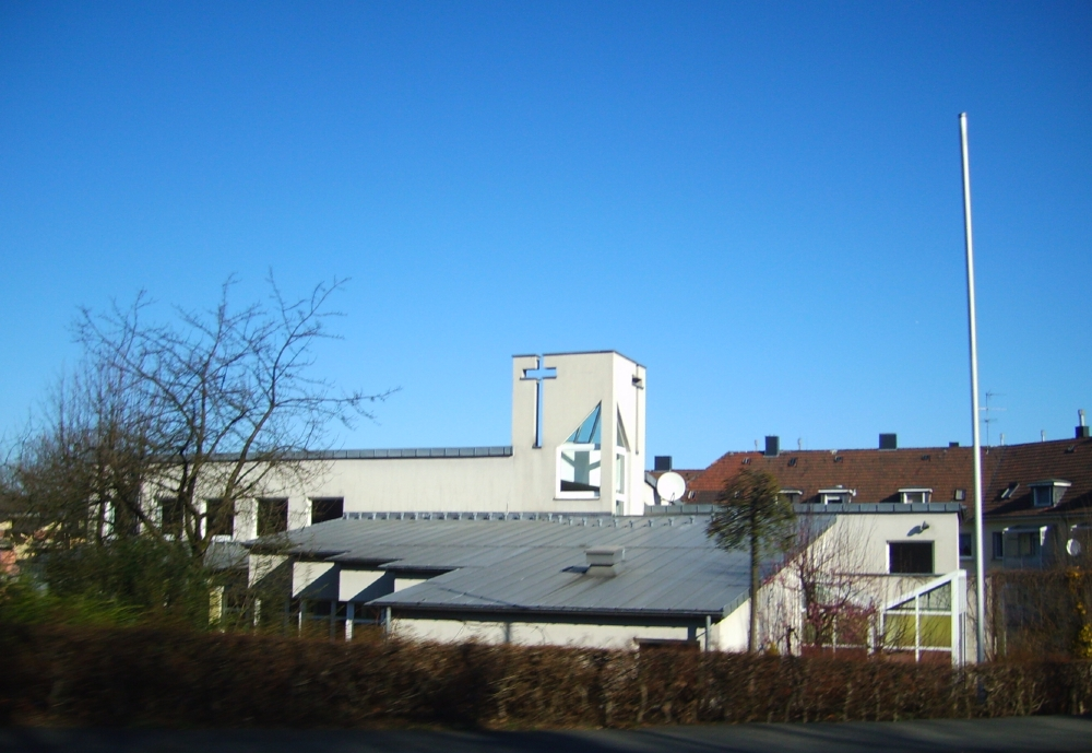 Freie evangelische Gemeinde Vohwinkel, Wuppertal, Germany